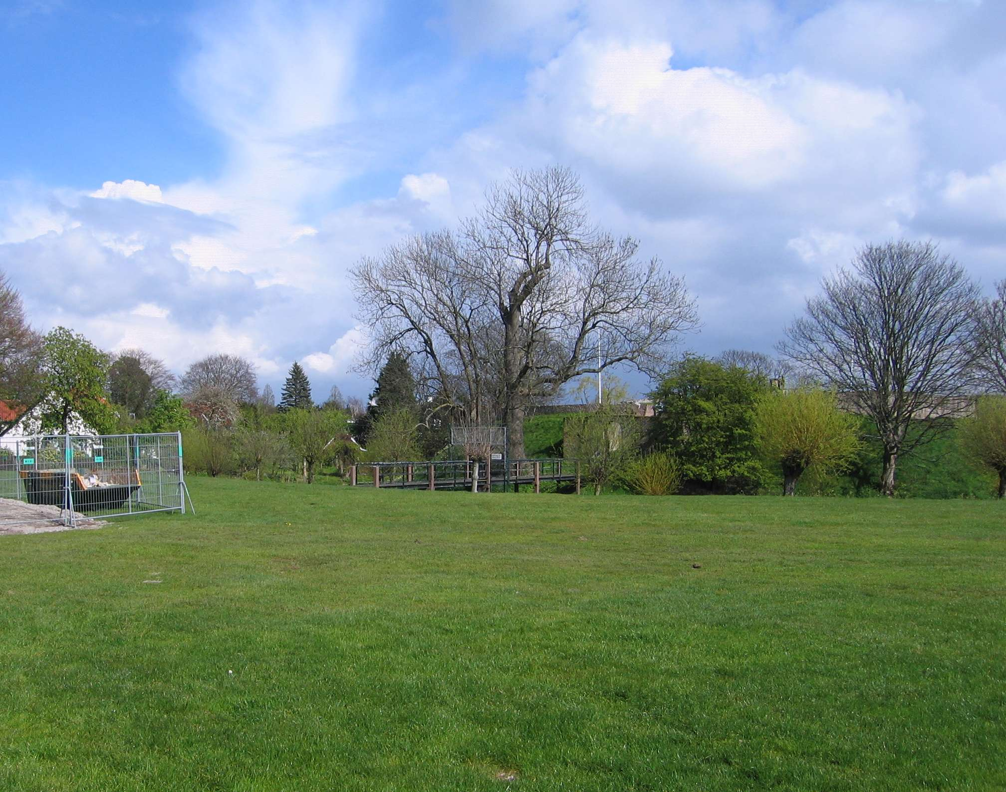 Burcht Hoflaan Oostvoorne